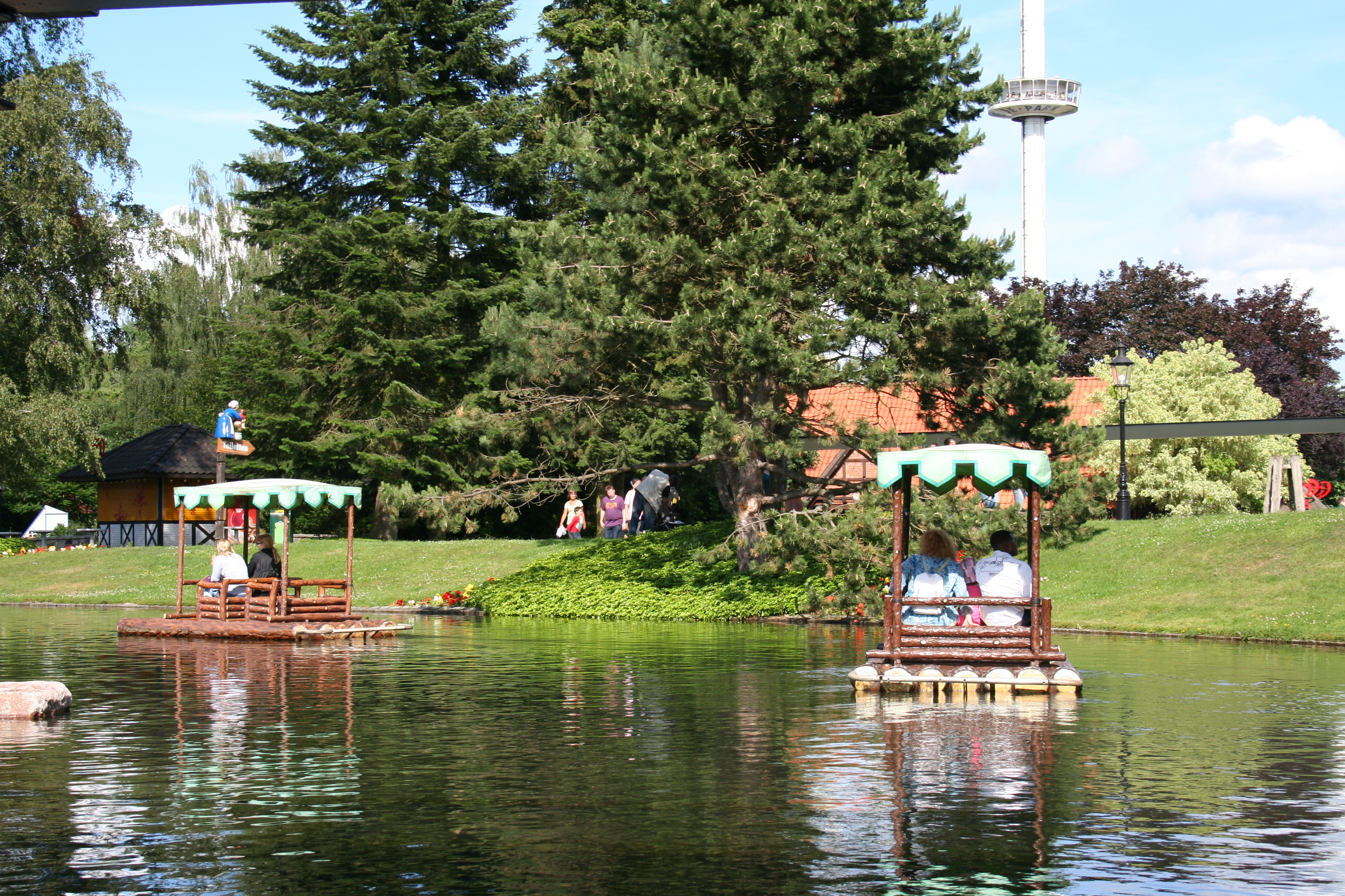 Heide Park Resort , Soltau.